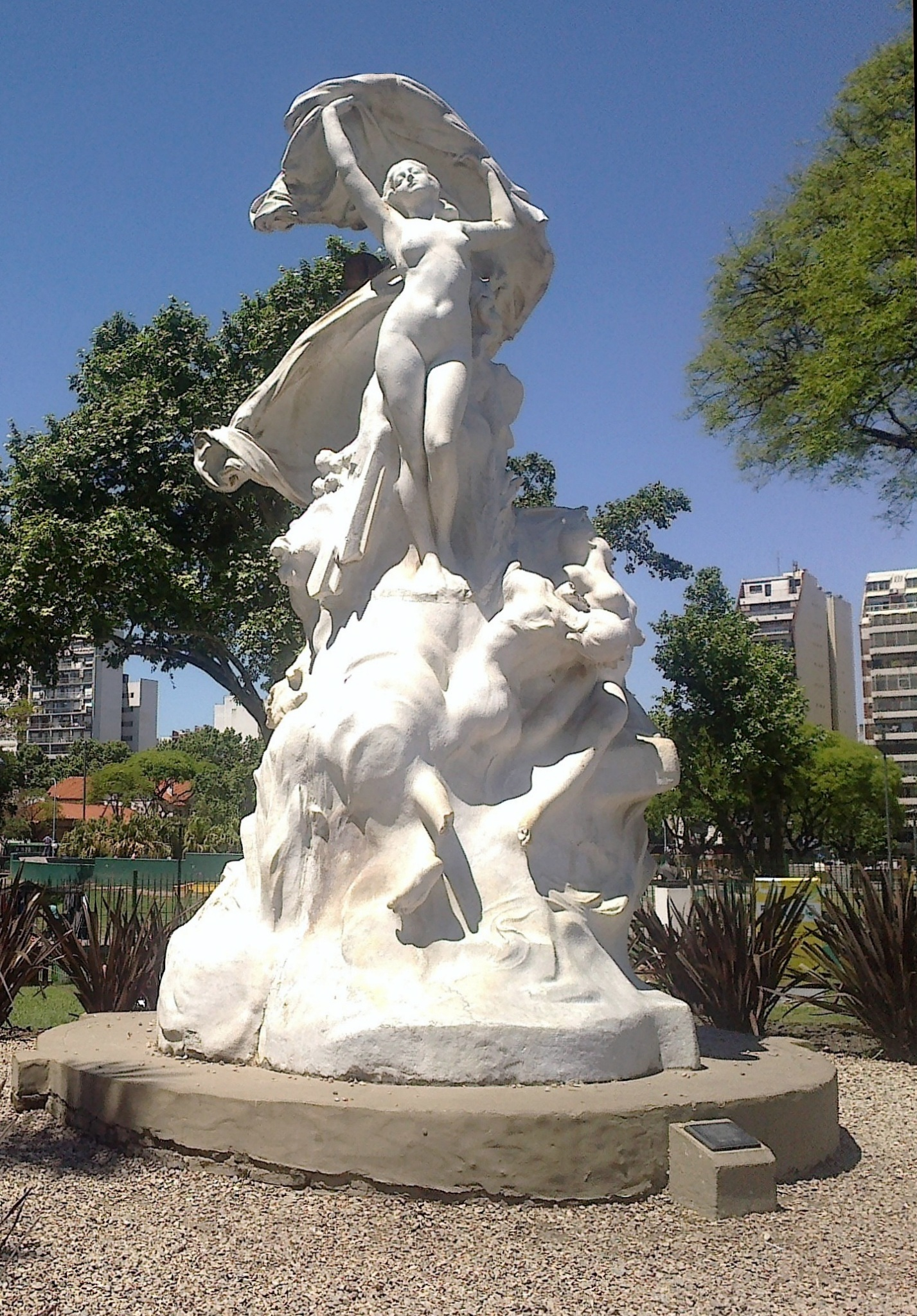 La Aurora, en Parque Centenario (Buenos Aires), del francés Émile Peynot